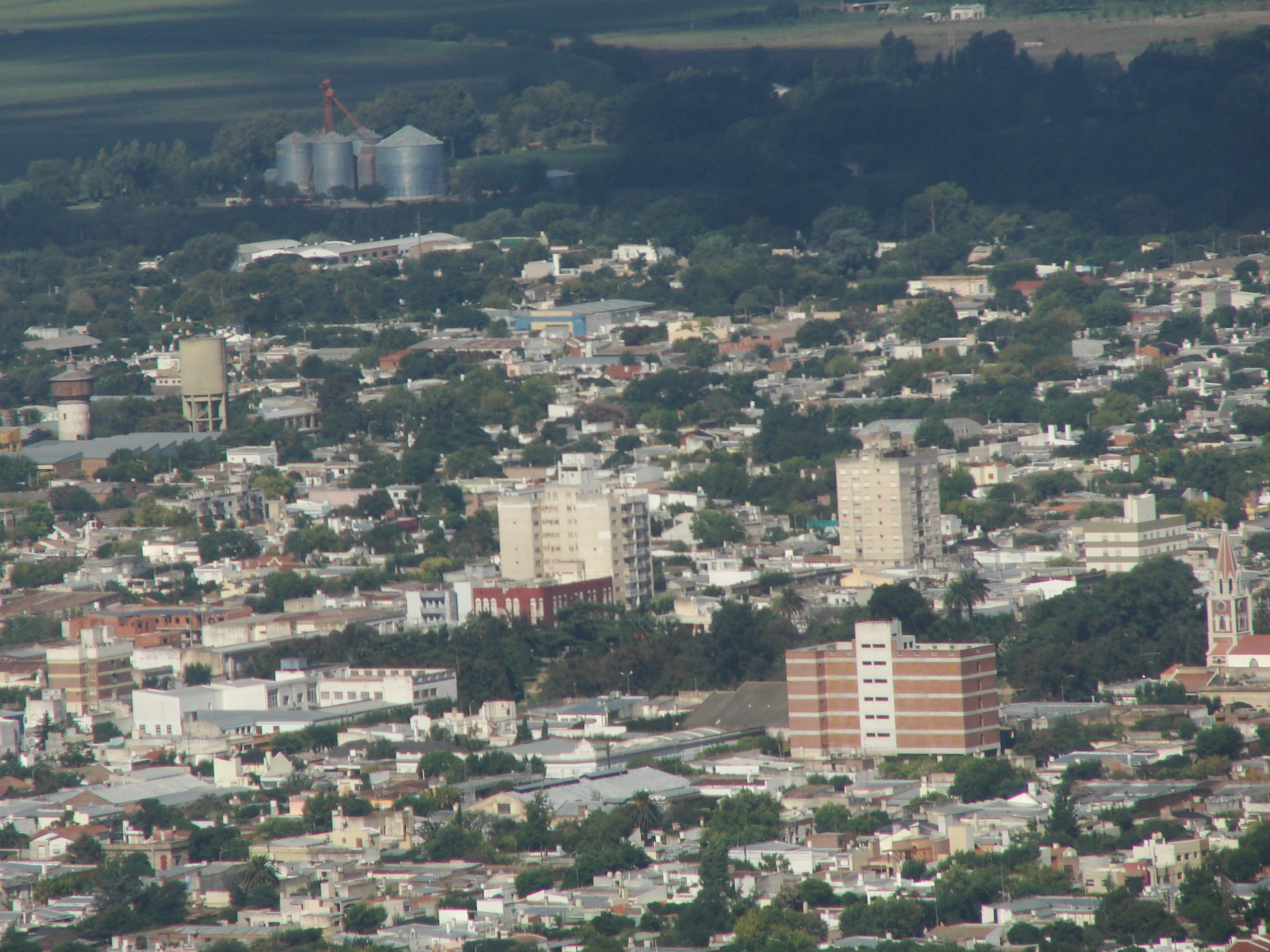 Vista de 9 de Julio, Prov. de Buenos Aires.